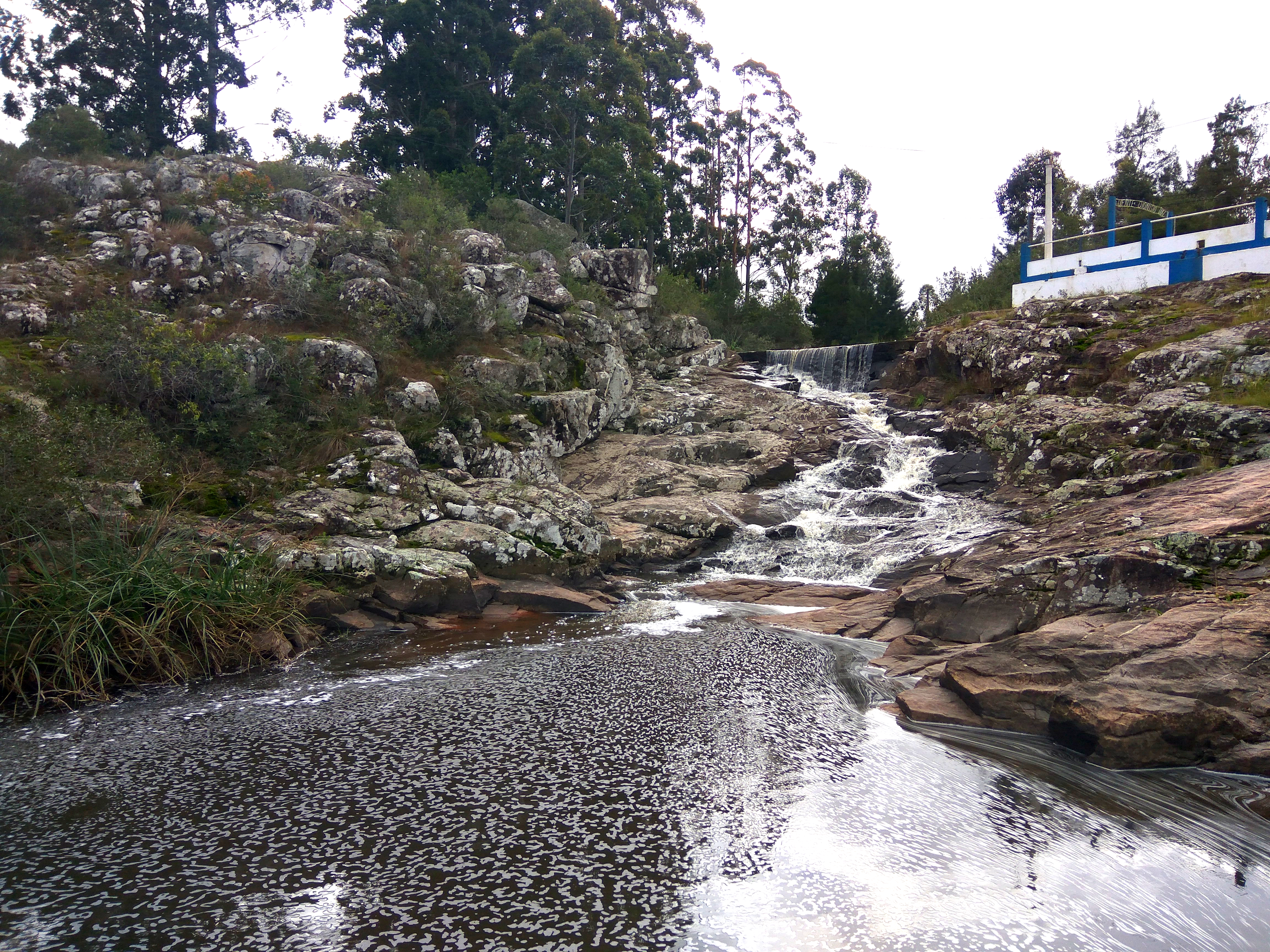 Complejo Salto de Agua. Balneario de la localidad de Cerro Chato. Departamento de Treinta y Tres, Uruguay.